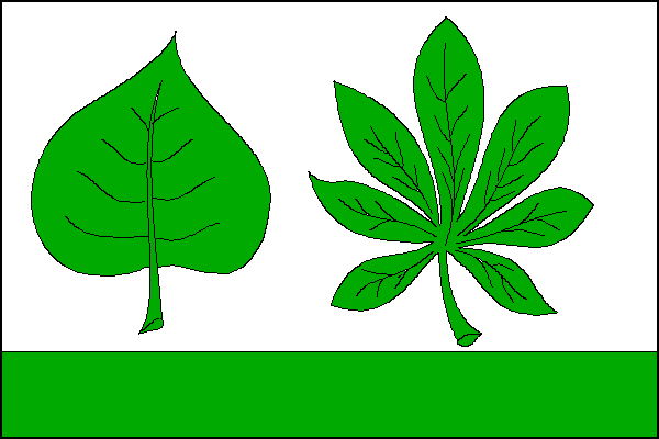 vlajka, Chlumek, okres Žďár nad Sázavou